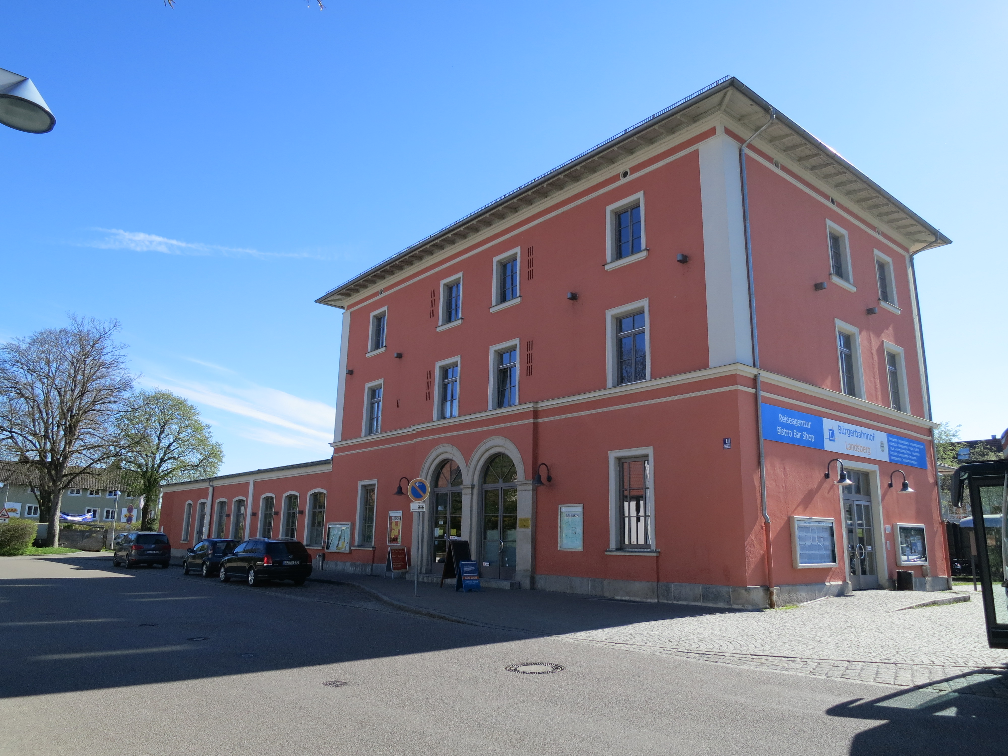 Empfangsgebäude des Bahnhofs Landsberg (Lech) von der Straßenseite